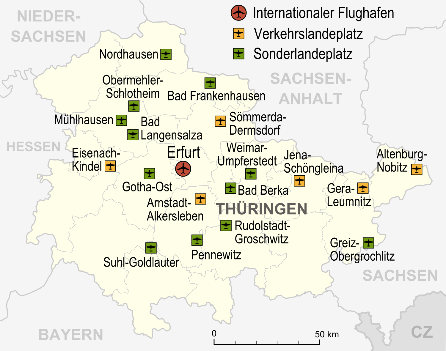 Flughäfen, Verkehrslandeplätze, Sonderlandeplätze und Wasserlandeplätze in Thüringen, Stand 2007